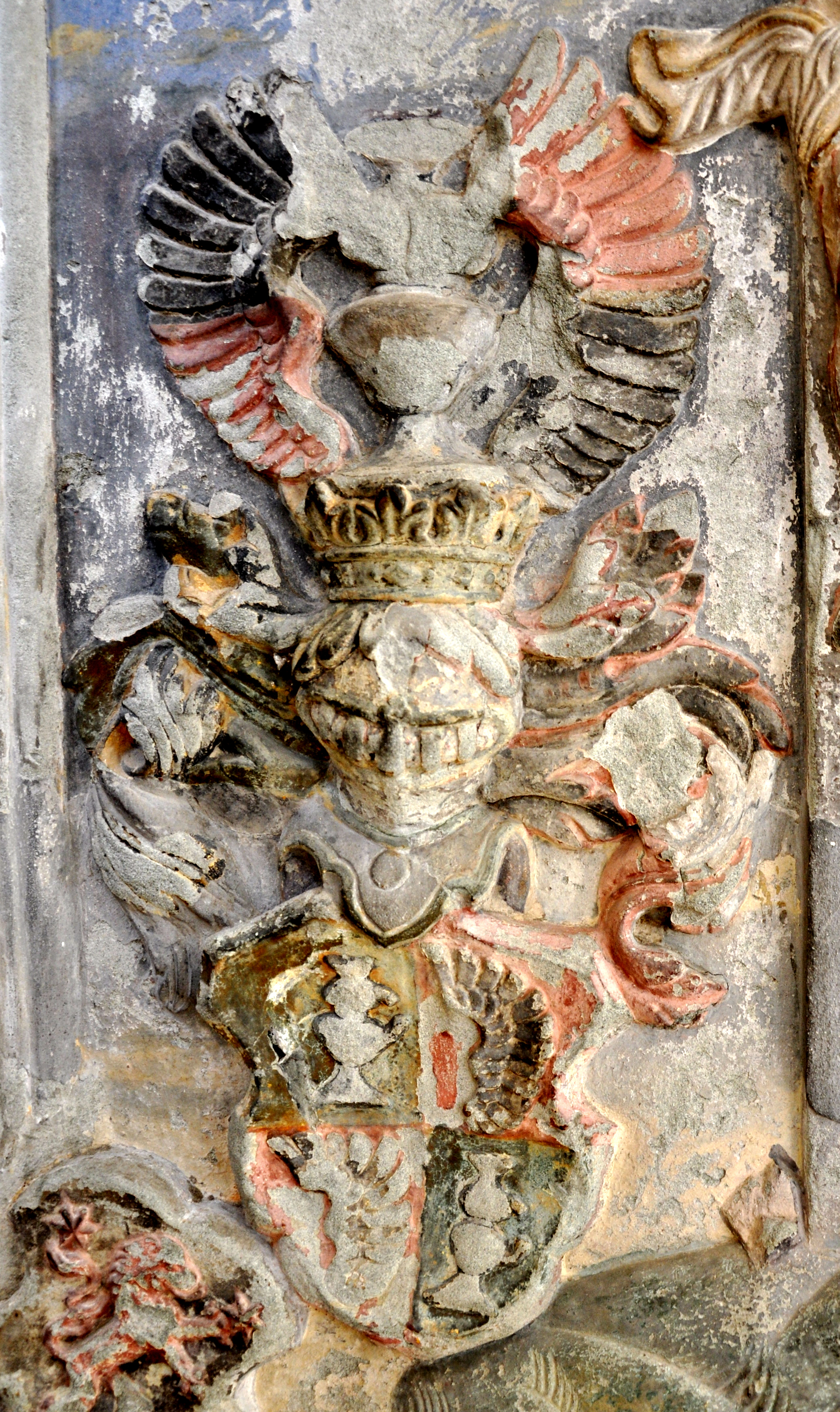 Weißenau, Ehemalige Klosterkirche (heute Pfarrkirche St. Peter und Paul), Sandstein-Epitaph des Christoph Volland von Vollandsegg († 1608), Stallmeister der Königin von Polen. Detail: Wappen Volland, In 1. und 4. in Gold ein schwarzer Schenkenbecher, in 2. und 3. in Rot ein silberner Flug.